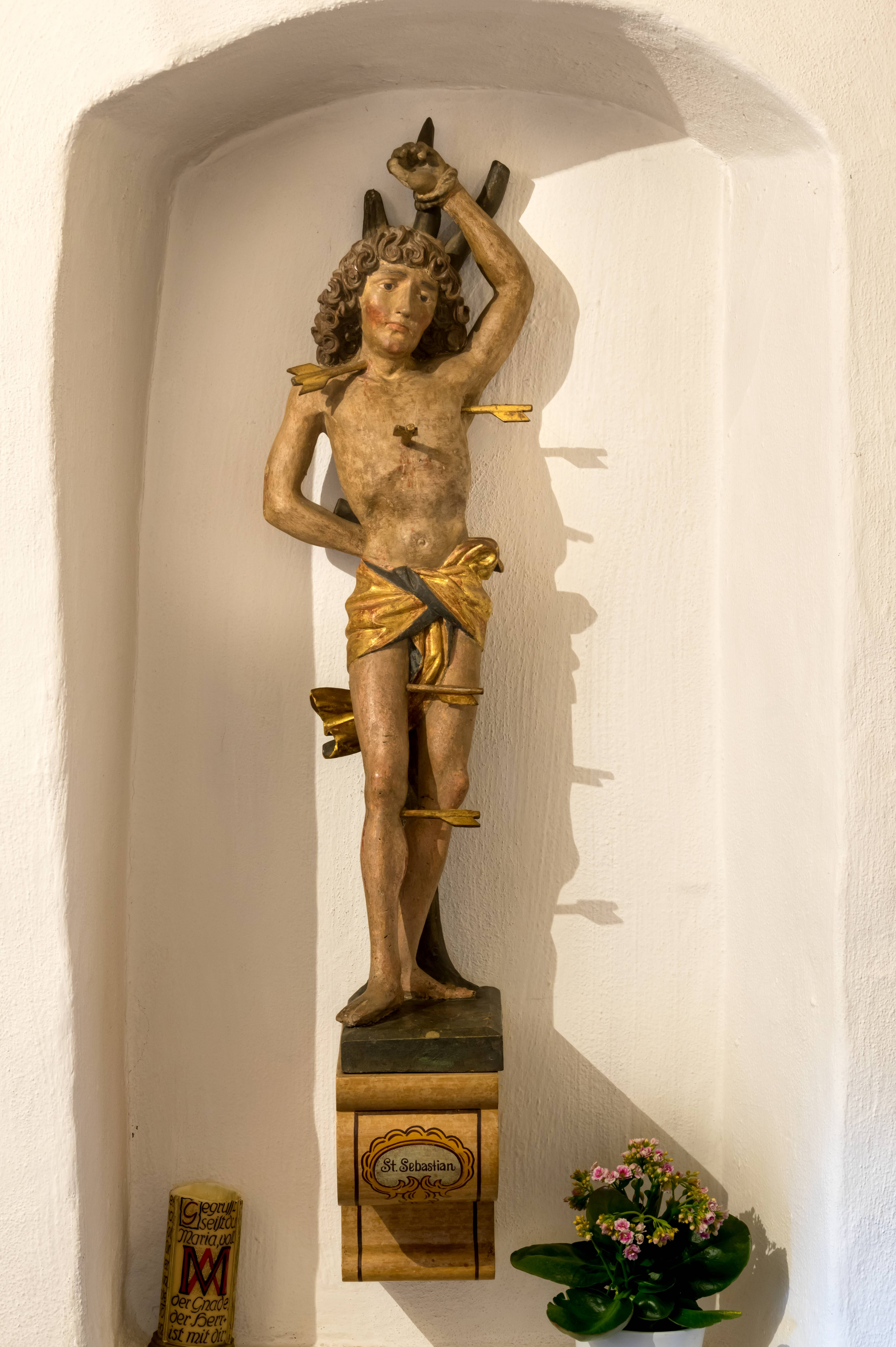 Bilder von St. Columba. in Pfaffenweiler Marienkapelle